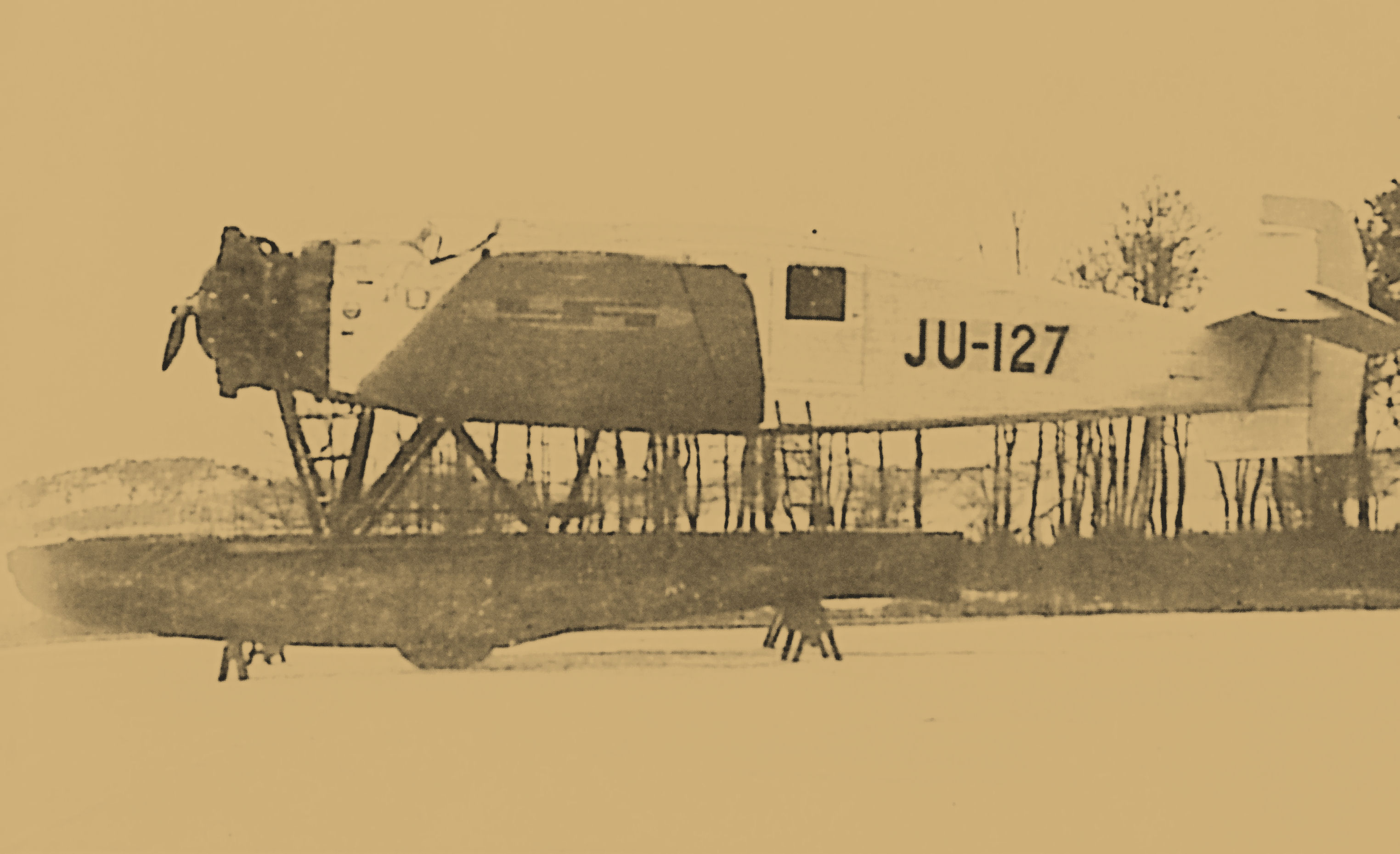 Junkers W.34, lempinimeltään "Junnu", jota käytettiin kaukopartimiesten huoltokoneena, haavoittuneiden evakoimisessa.